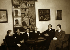 Kinostyret i Oslo i jubileumsåret 1951. Fra venstre: Kristoffer Aamot, Rolf Stranger, Gudrun Sunde, Rolf Hofmo, Kåre Haugen og fiannsrådmann Egil Storstein (Per Heiberg og Albert Mathiesen var ikke tilstede da bildet ble tatt). Fotograf ukjent. Original i Oslo byarkiv.